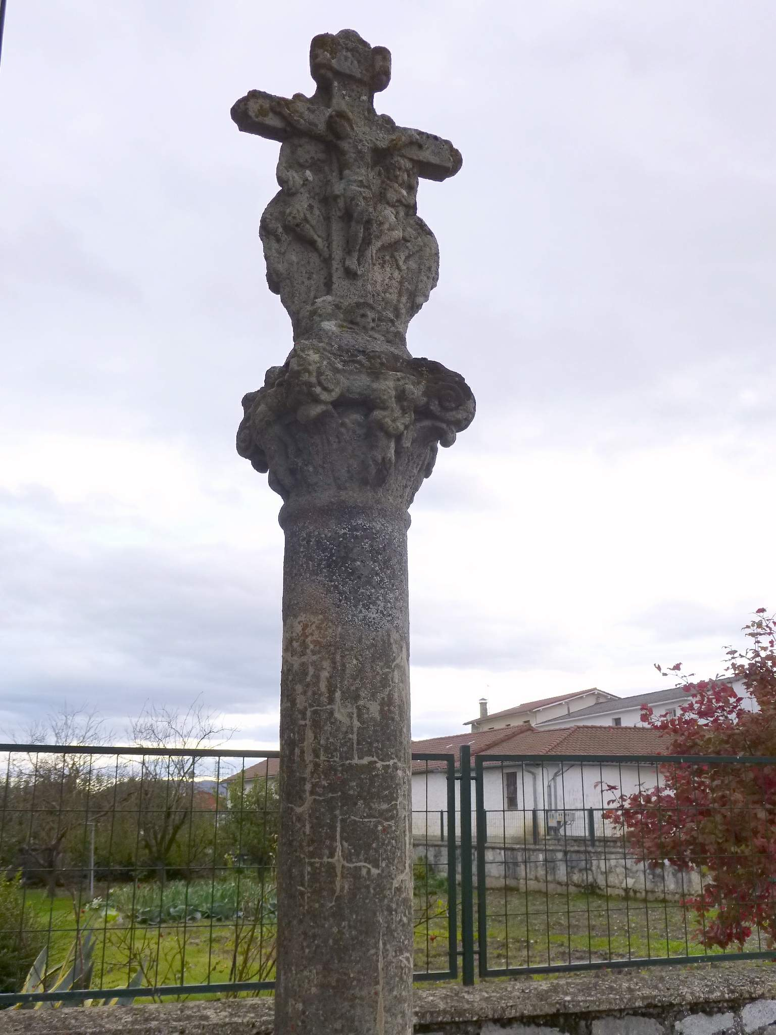 Gobeo (Vitoria, Álava)